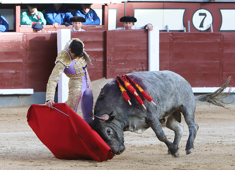 Fotografía donde se puede apreciar al torero Saúl Jiménez Fortes realizando un derechazo en el transcurso de una de sus faenas. El toro en cuestión se llama "Mucamo".